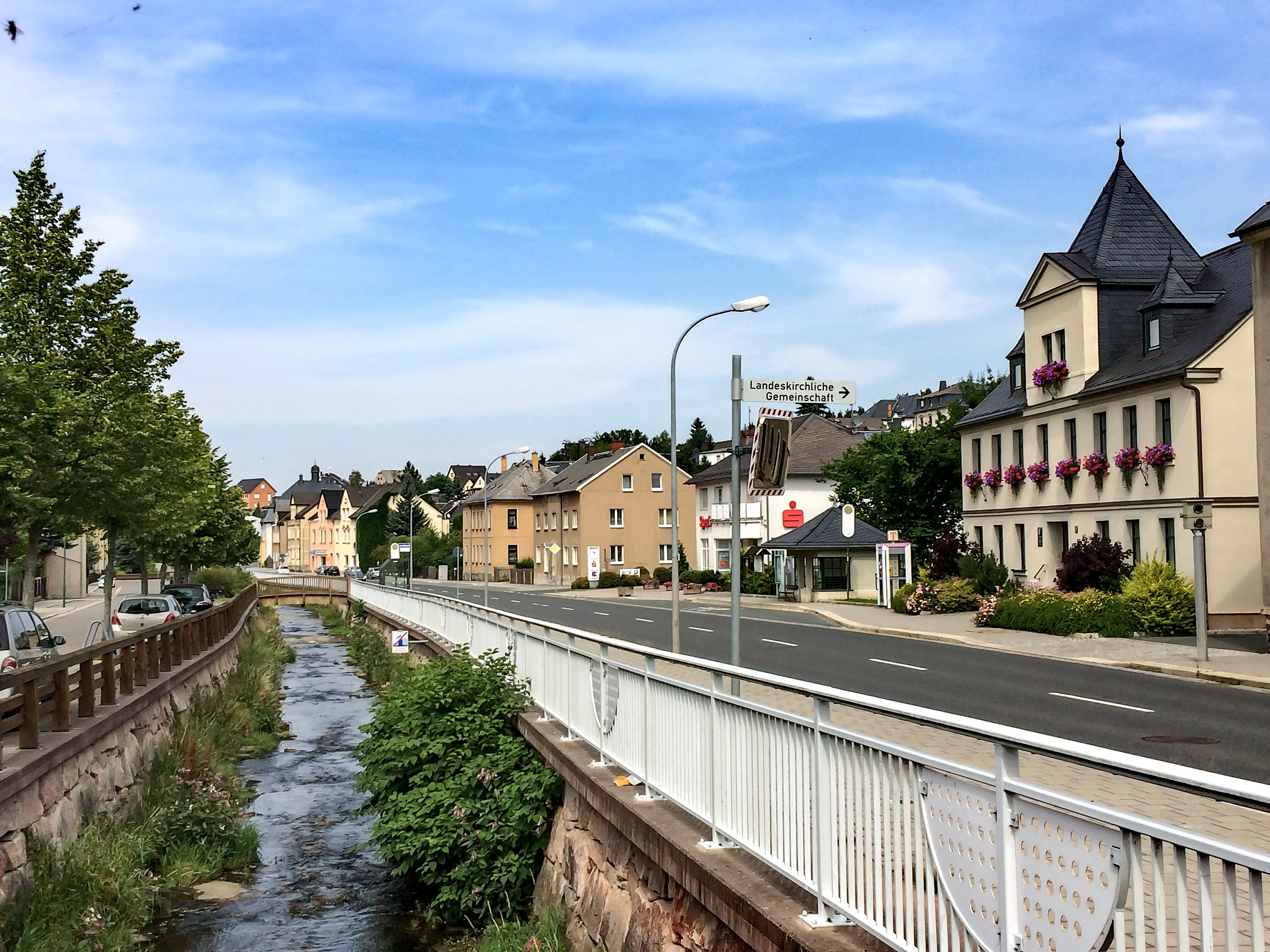 Ellefeld Vogtland Hauptstrasse, Juli 2014